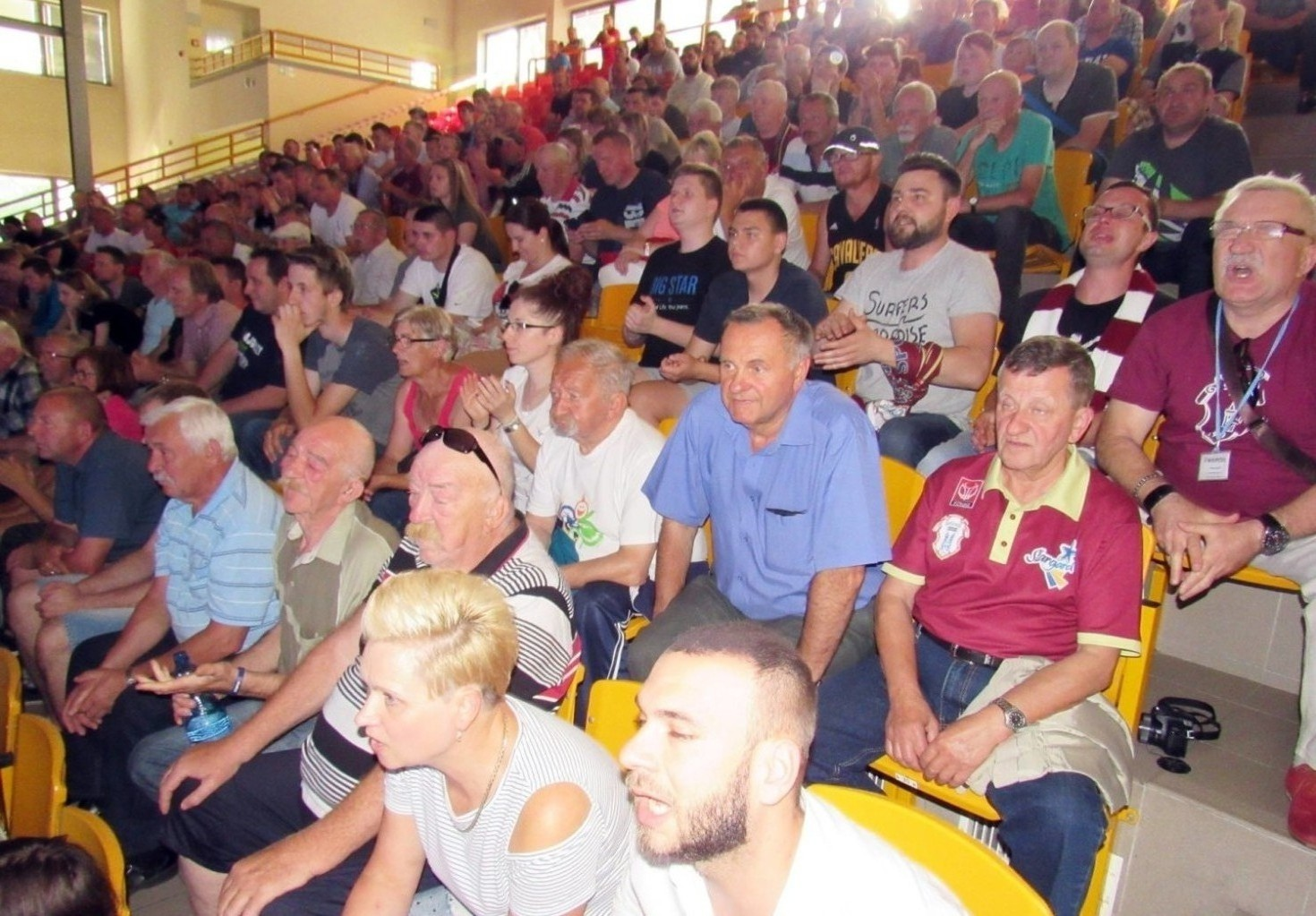 Transmisja z Łańcuta na telebimie w Stargardzie (17.05.2018)